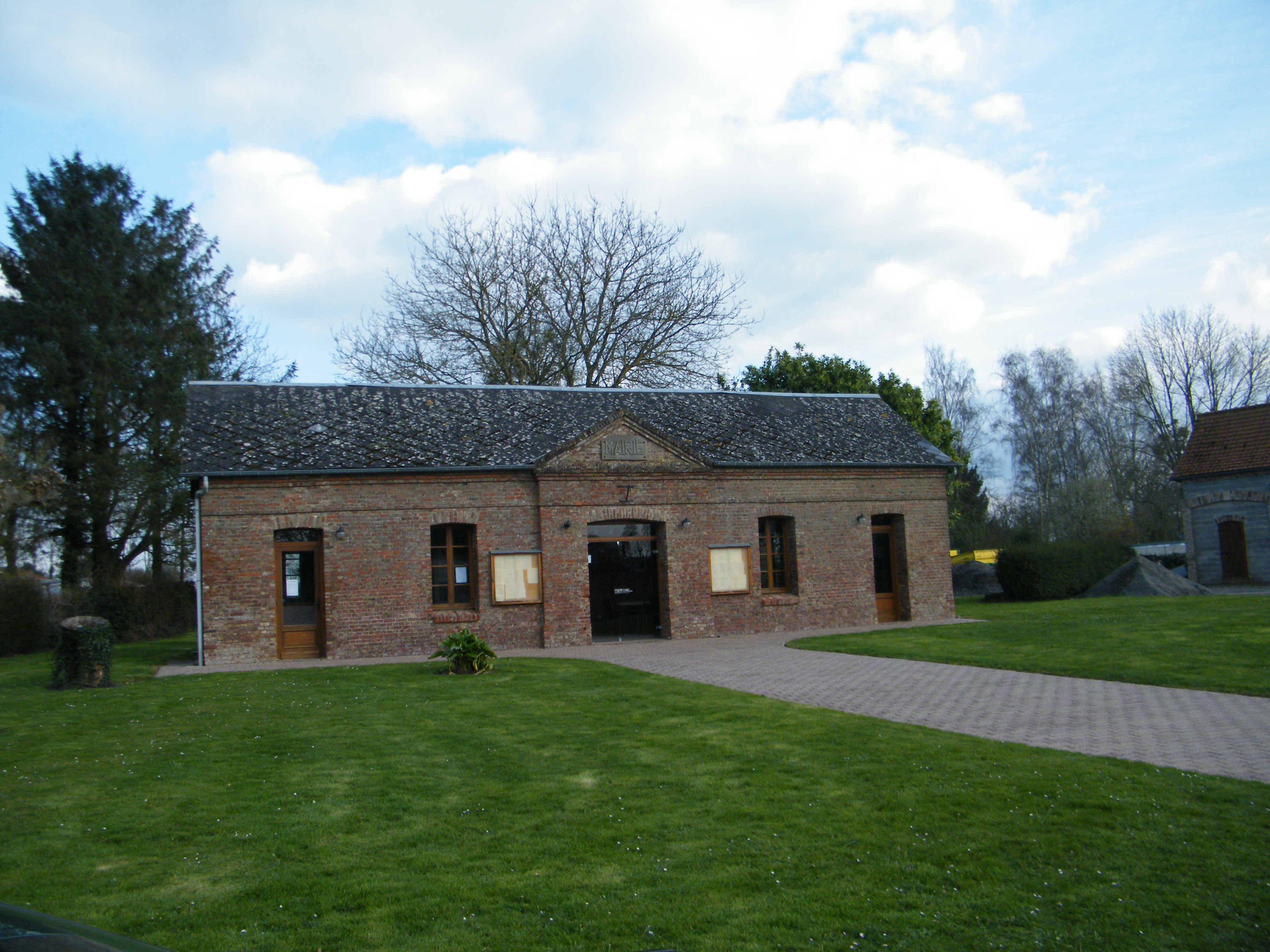 Bâtiments communaux : la mairie.